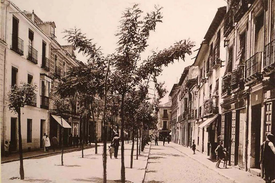 Calle Libreros de Alcalá de Henares (Comunidad de Madrid - España) cuando tenía un bulevar hacia 1920.